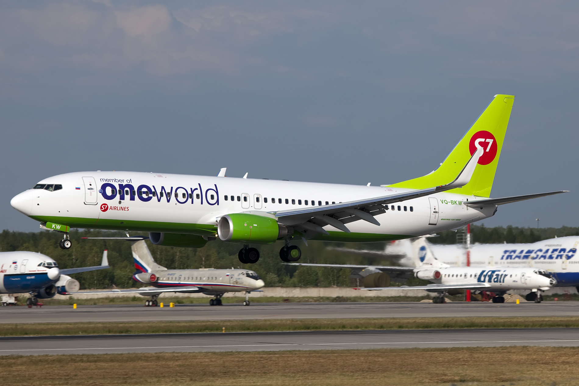 Moskou-Domodedovo